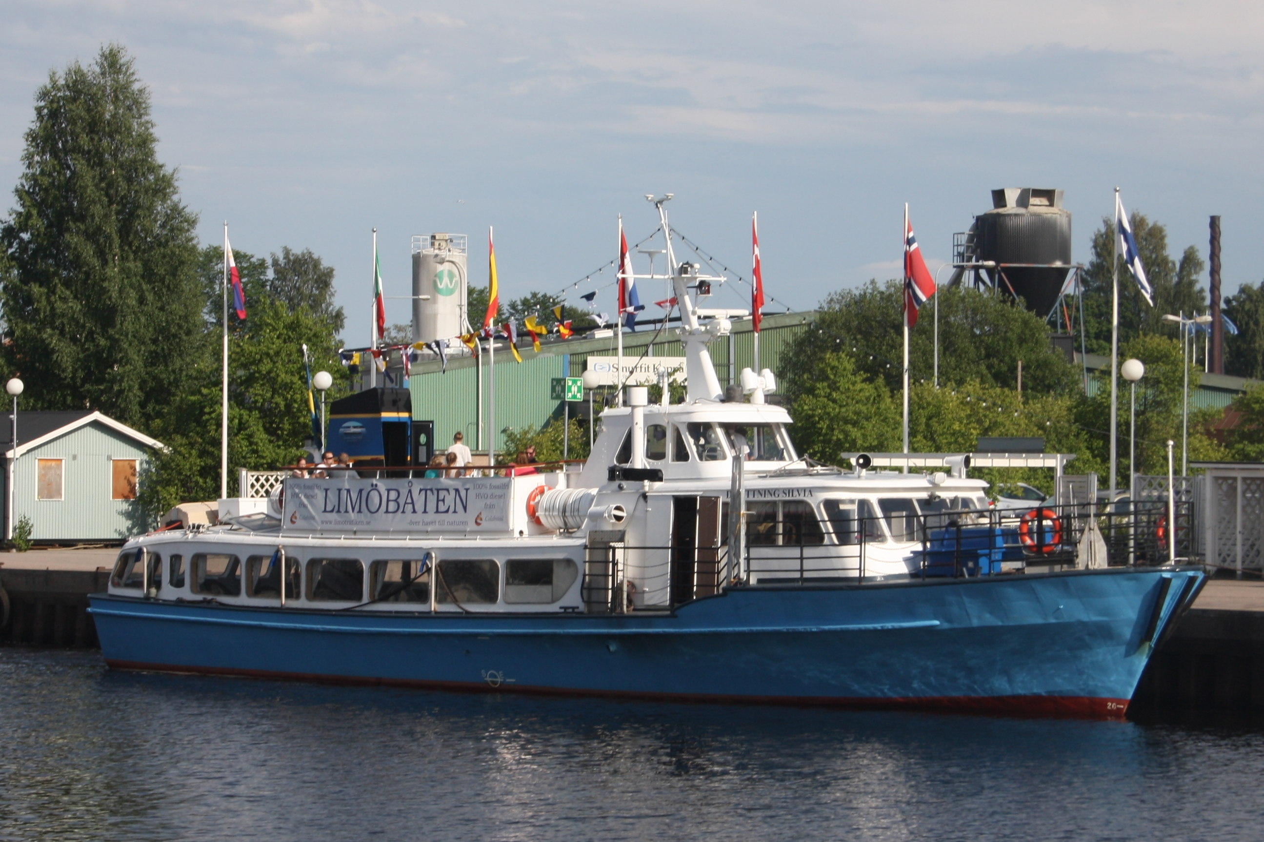 Limöbåten i Gävle